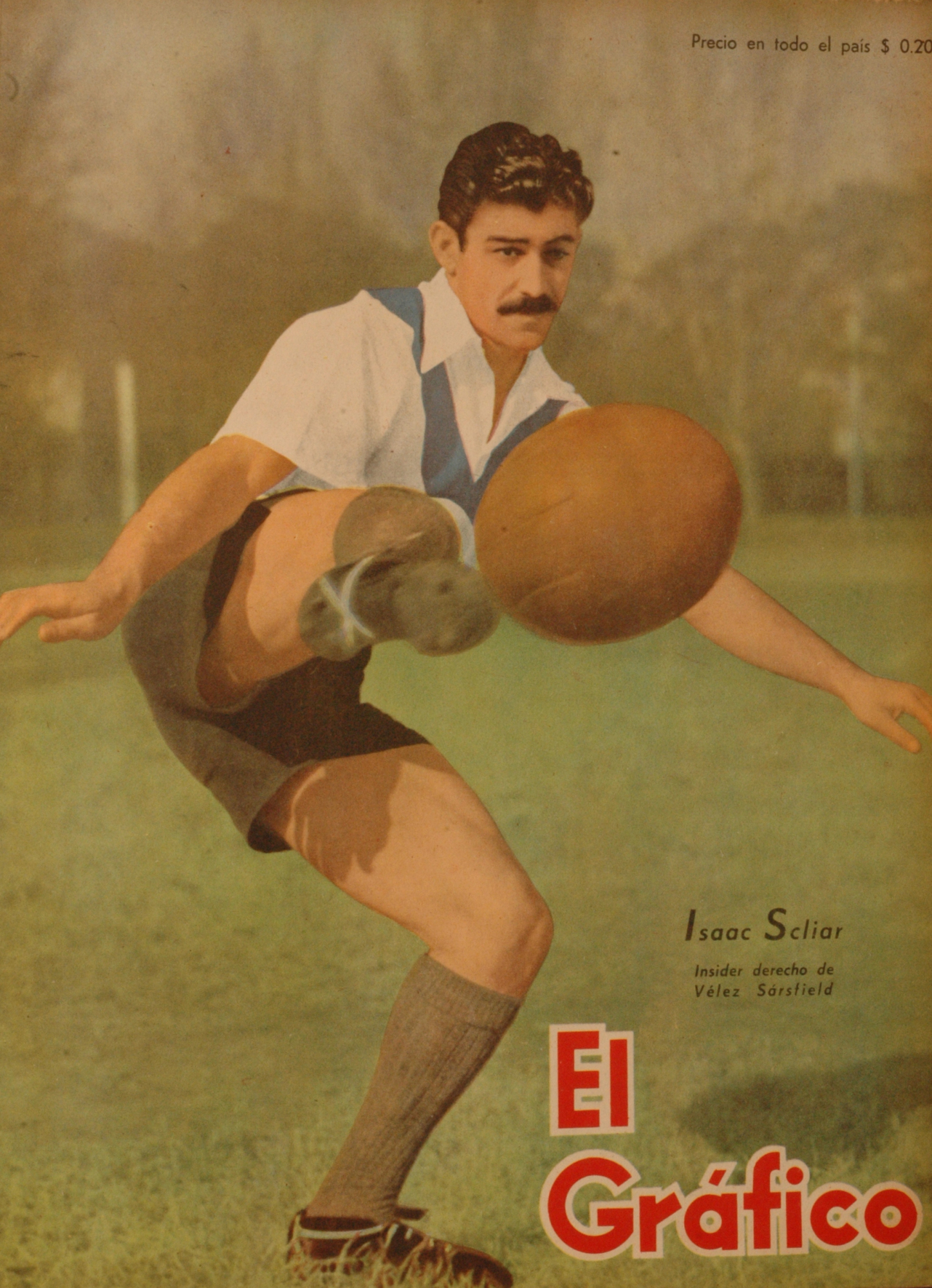 El Grafico del 02 de Agosto de 1946. Edicion 1412